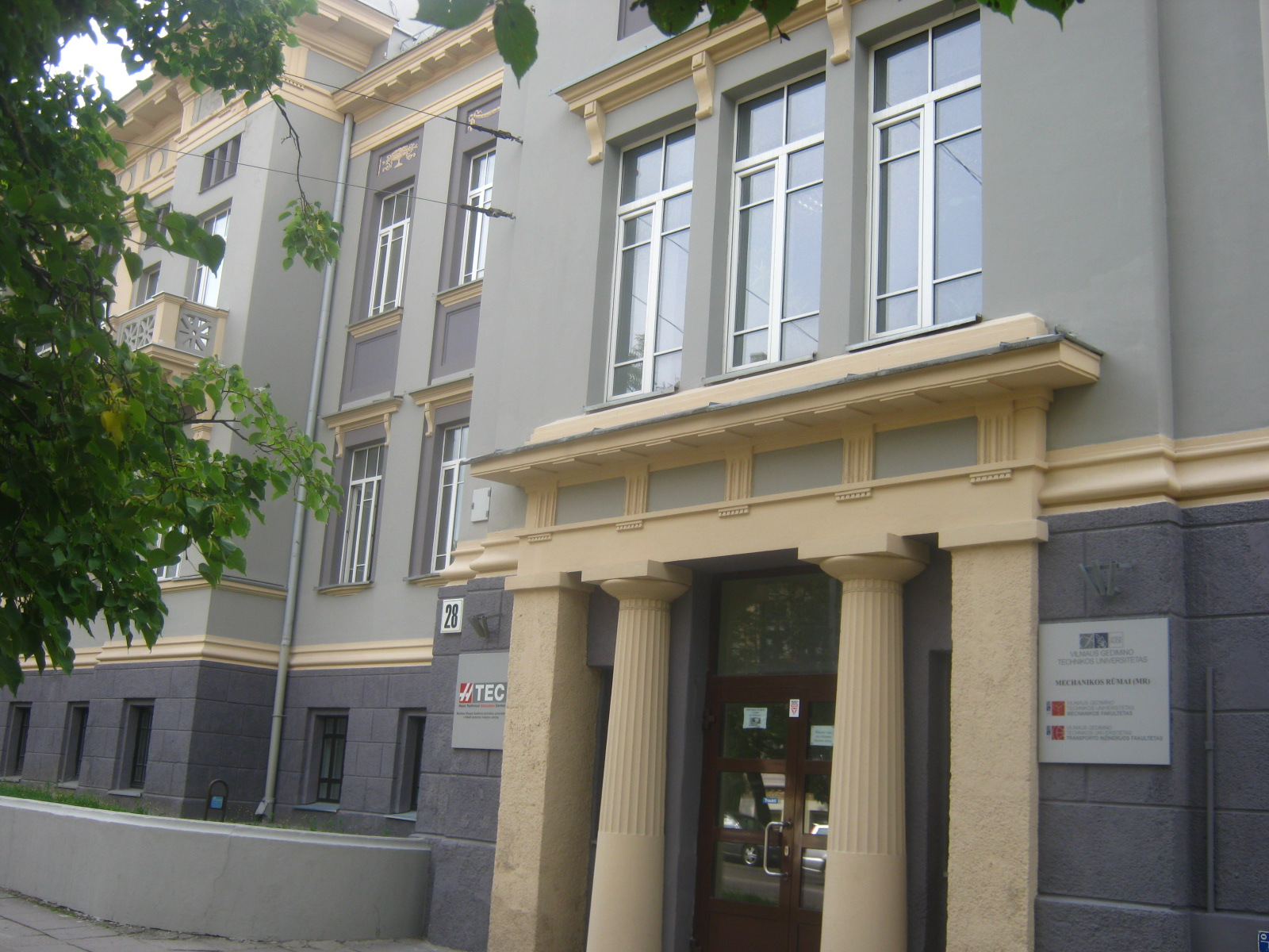 VGTU Mechanikos fakultetas